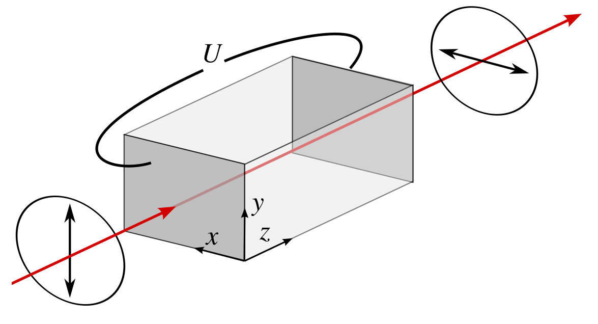 Uporaba Pockelsovega pojava. Z dodanima polarizatorjem in analizatorjem sestavimo amplitudni modulator.